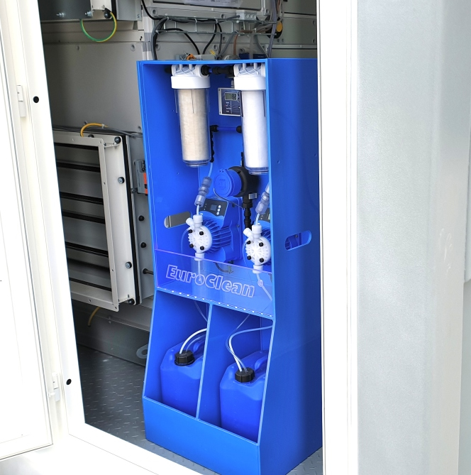 WatiMin je zařízení sloužící ke kontinuální, automatické a velmi přesné remineralizaci vody. Zpětná mineralizace vody se používá v případech, kdy do demineralizované (osmotické) vody je zapotřebí doplnit zdraví prospěšné látky, aby splnila legislativní požadavky na pitnou vodu